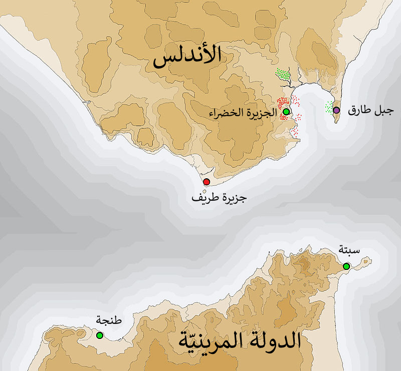 المرافئ الرئيسيَّة التي تحكَّمت بِالعُبُور من الأندلُس إلى المغرب والعكس، في سنة 1292